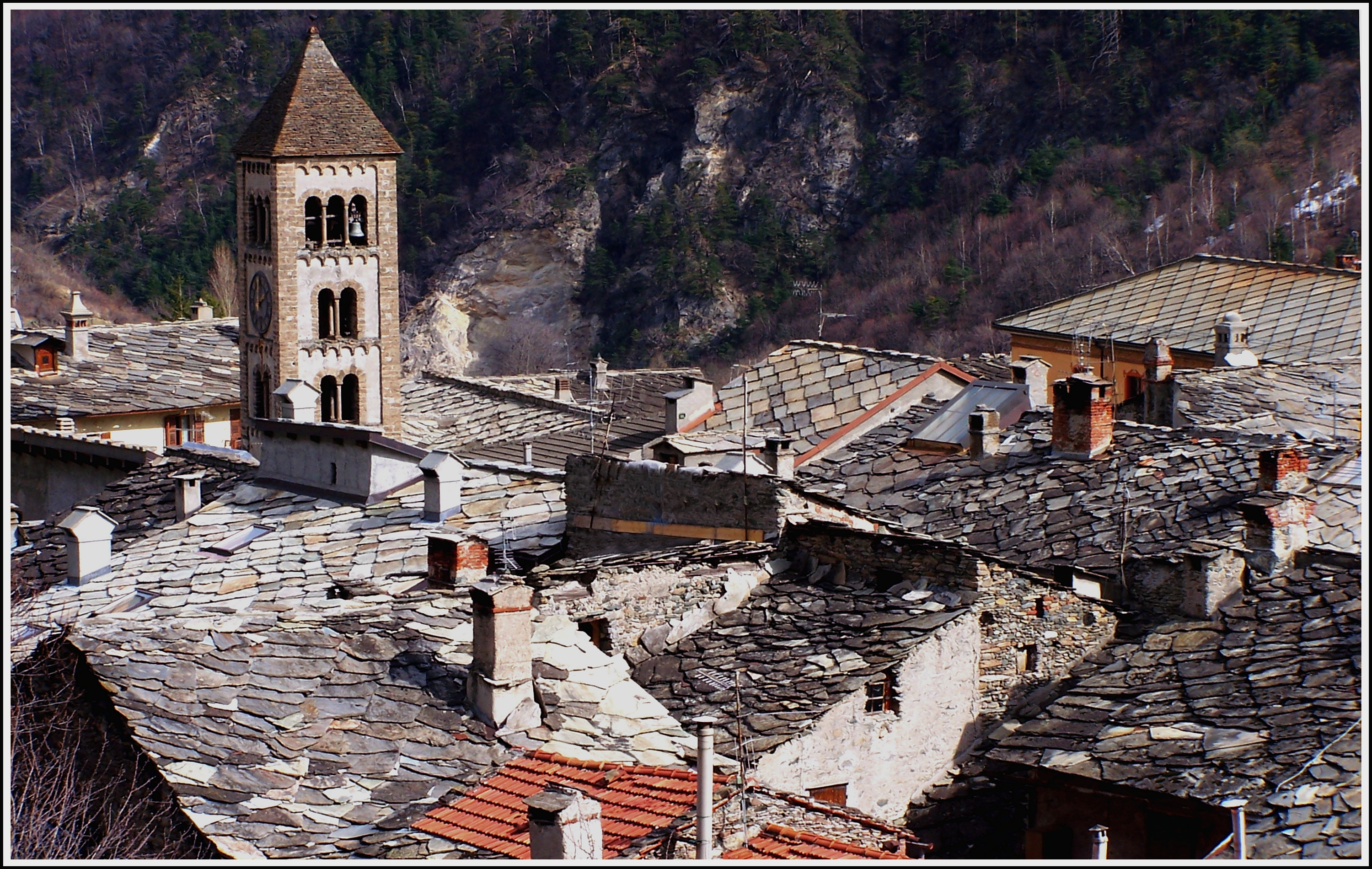 CSP gennaio 2010 - Exilles